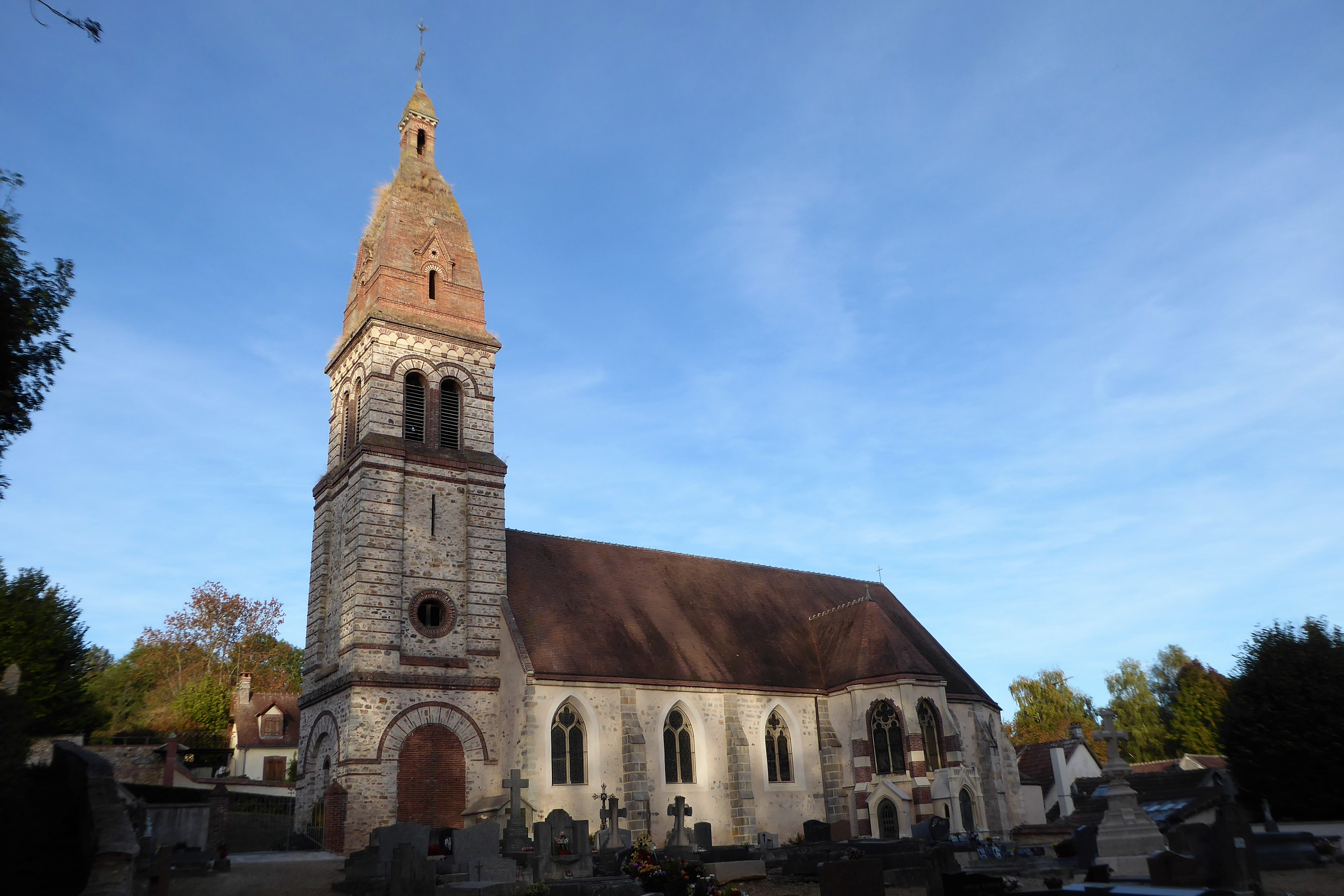 église Saint-Lô de Bréchamps, Eure-et-Loir, France.